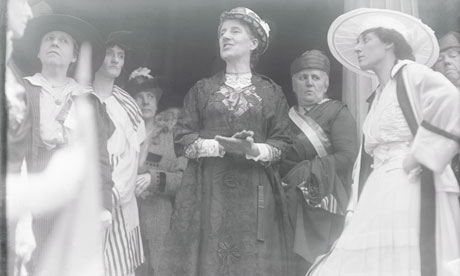 Feminist Charlotte Perkins Gilman